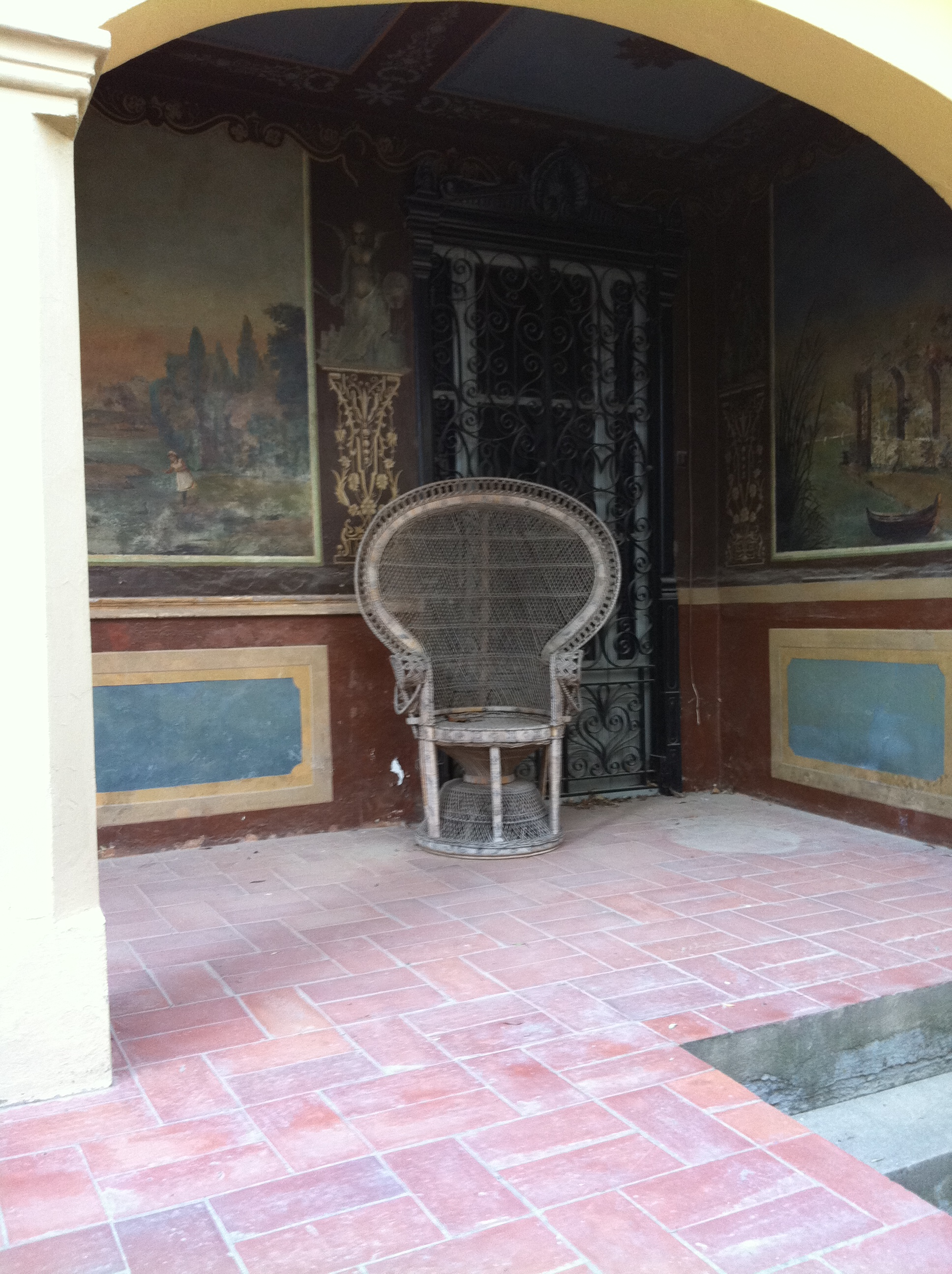 Begur